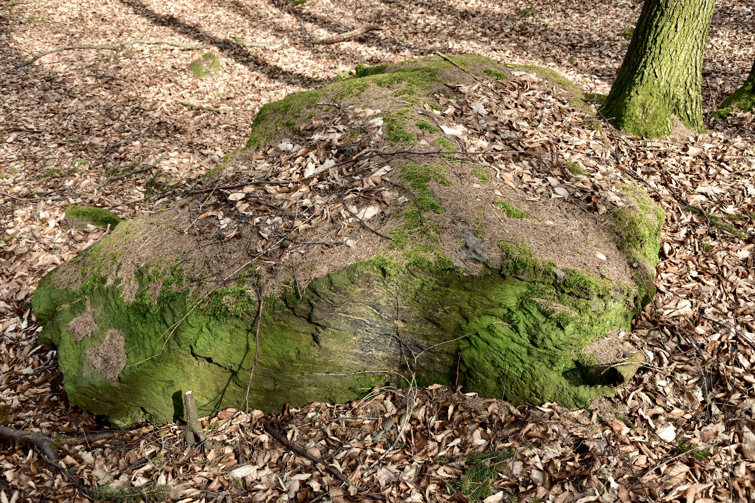 Romanowska Skałka